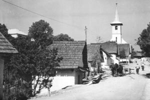 historia